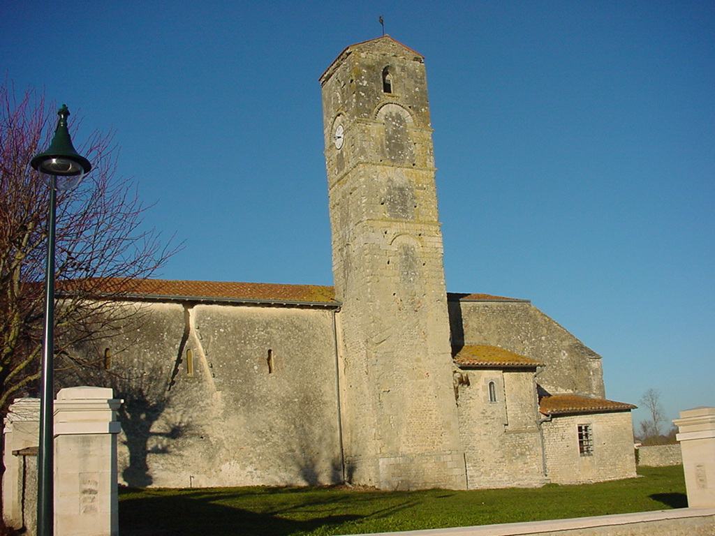 L'église de Saint-Denis-Du-Pin en Charente maritime